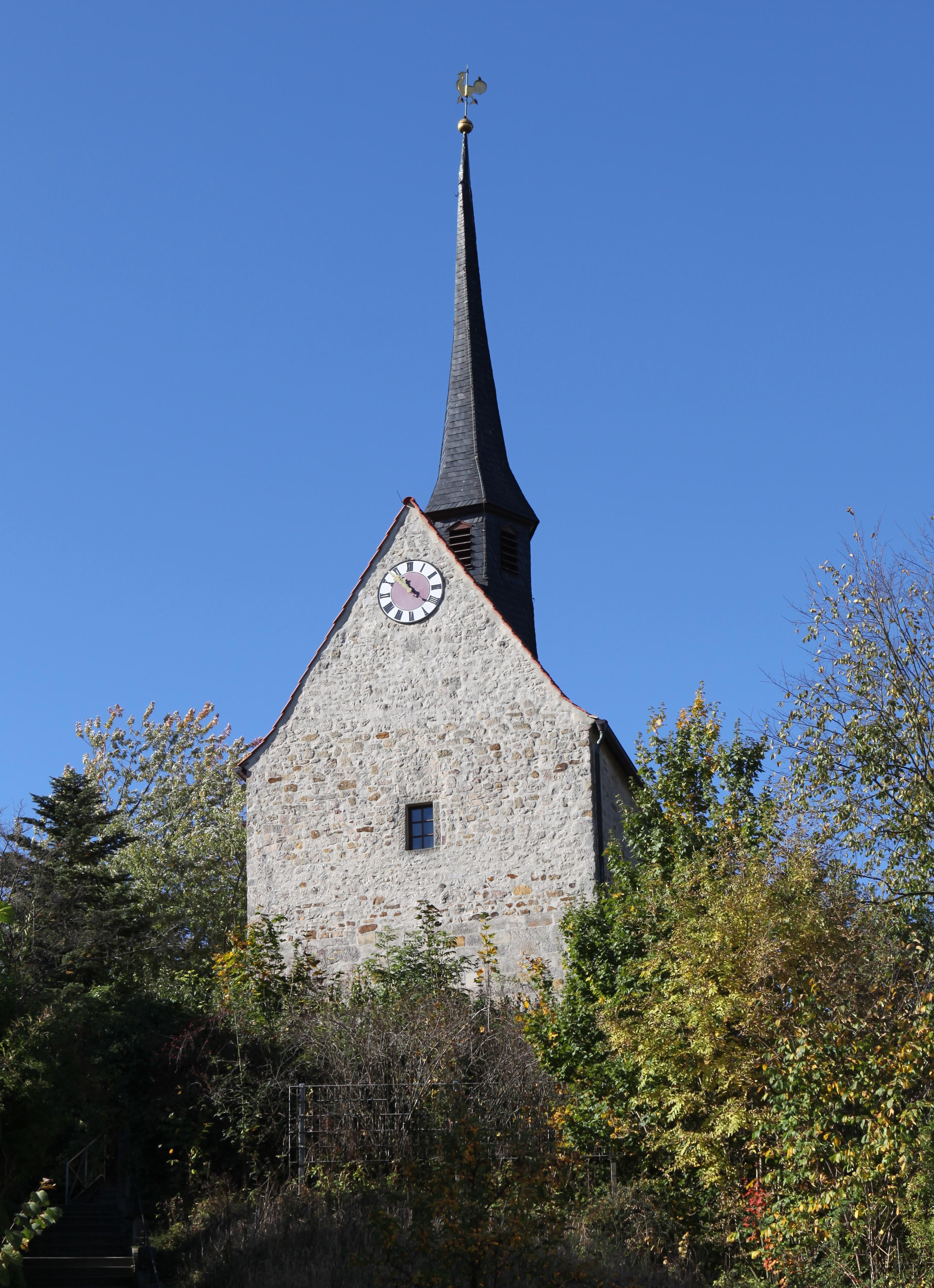 Evangelische Pfarrkirche St. Marien in Rödental, OT Einberg, Landkreis Coburg